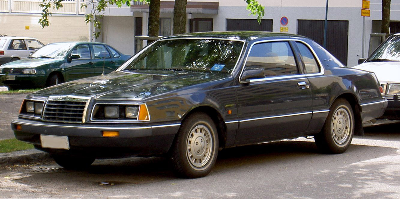 Ford Thunderbird 1985/86